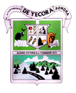 Escudo del municipio sonorense.